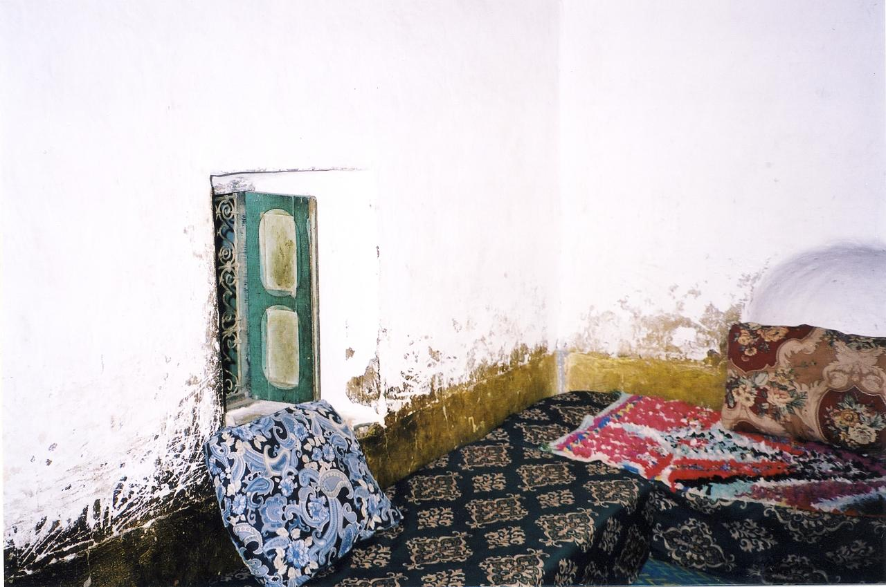 Morocco-137